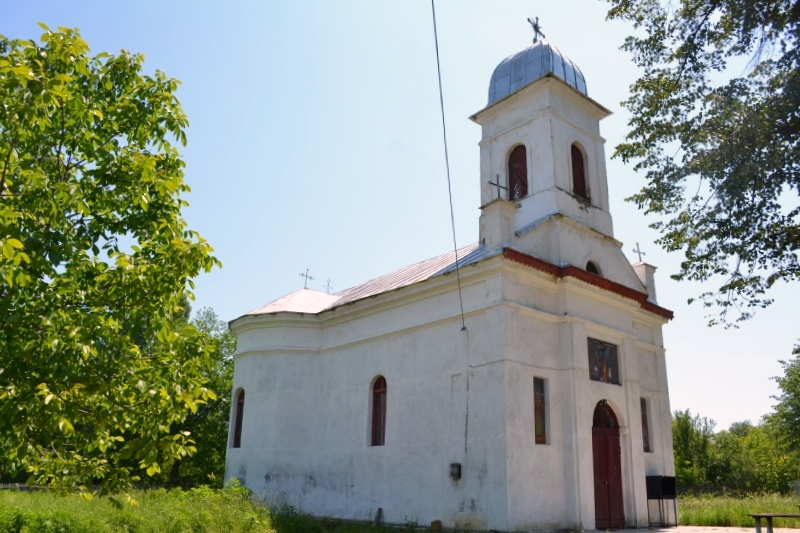 Biserica „Cuvioasa Paraschiva”, sat Buicești; comuna Butoiești în centrul satului 1892